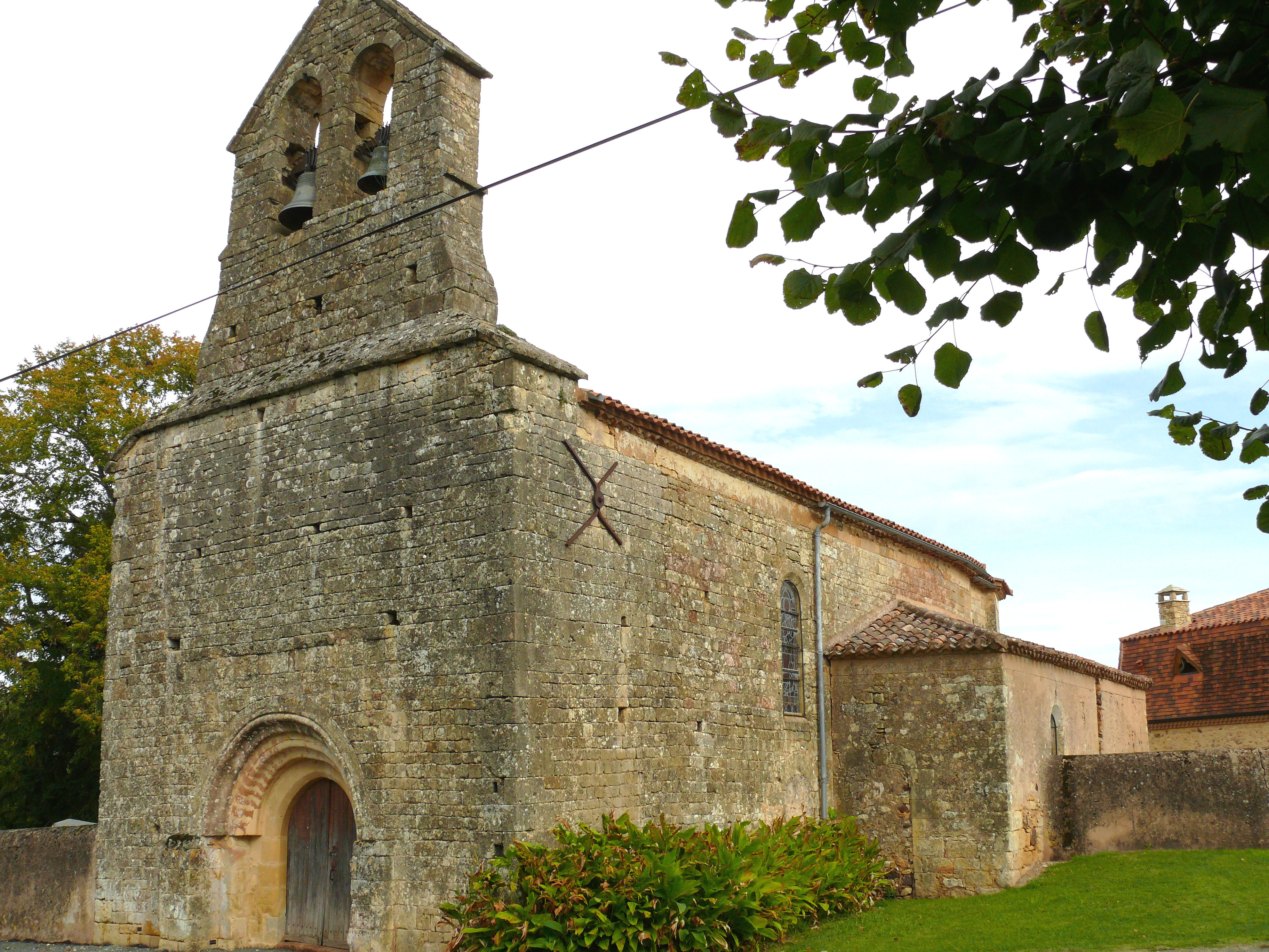 Belvès - Eglise de Fongalop